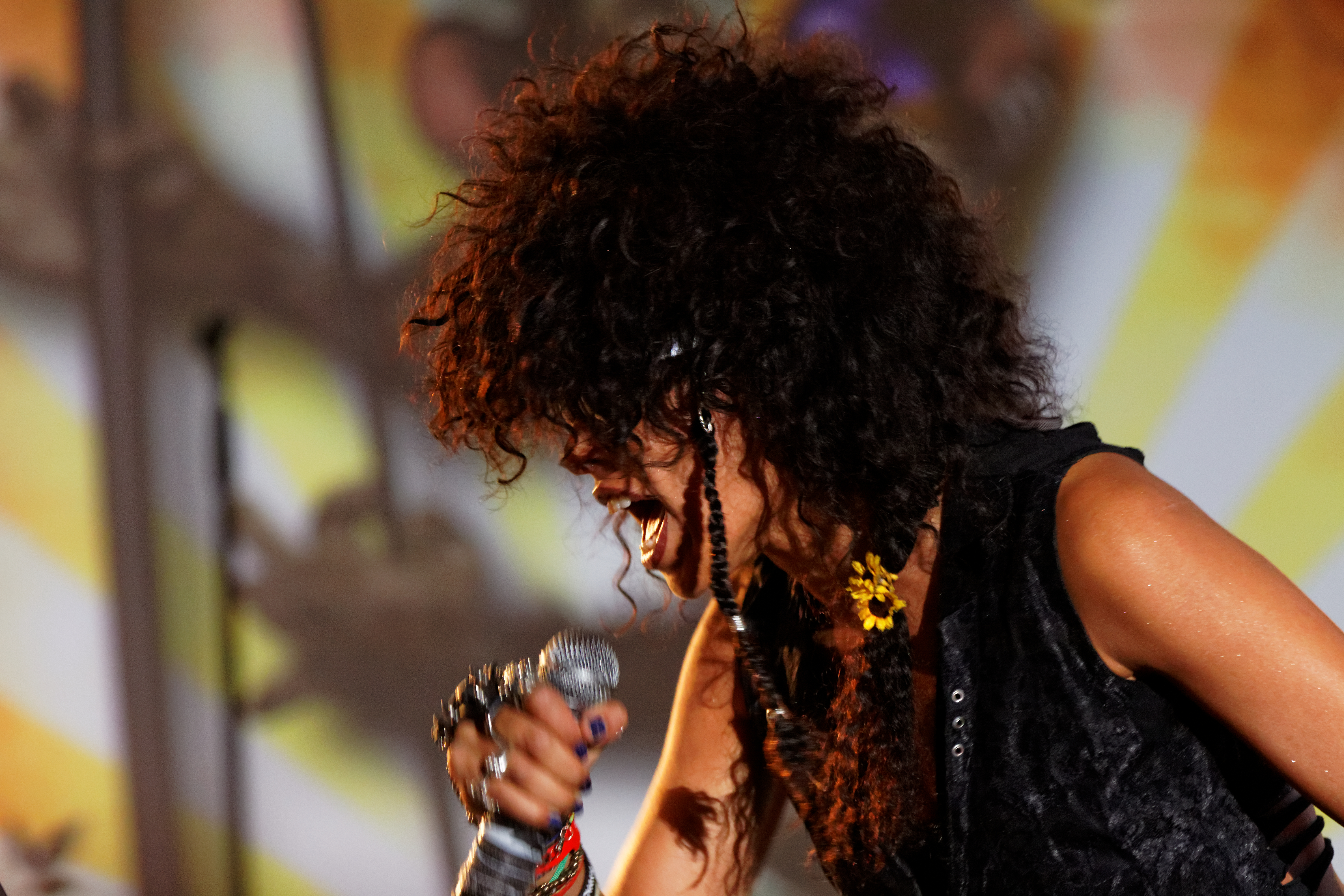 Shaka Ponk en concert sur la grande scène lors de la fête de l'Humanité 2012.